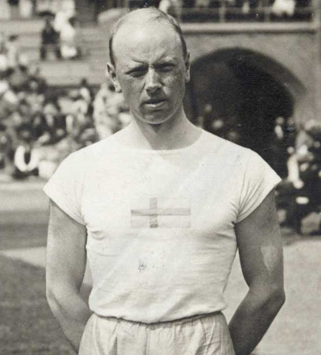 Åke Grönhagen